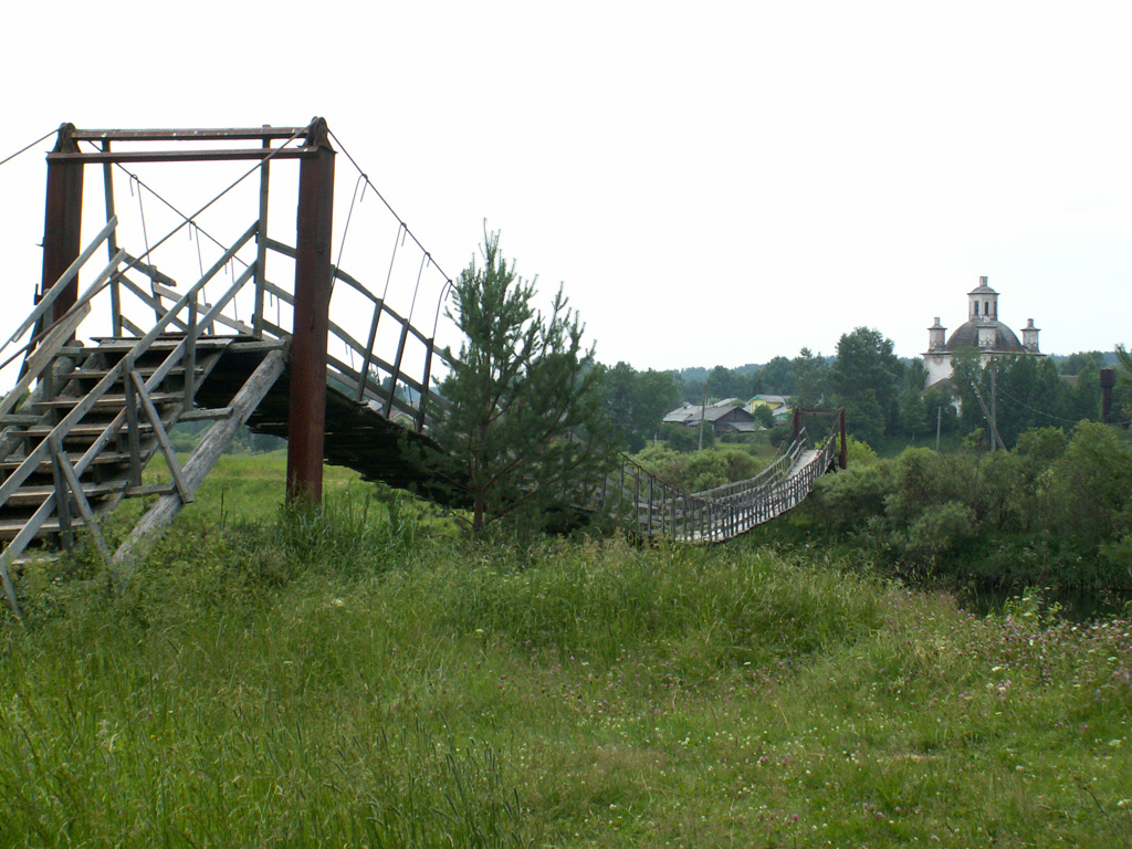 навесной мост через р.Вага и храм в Чушевицах